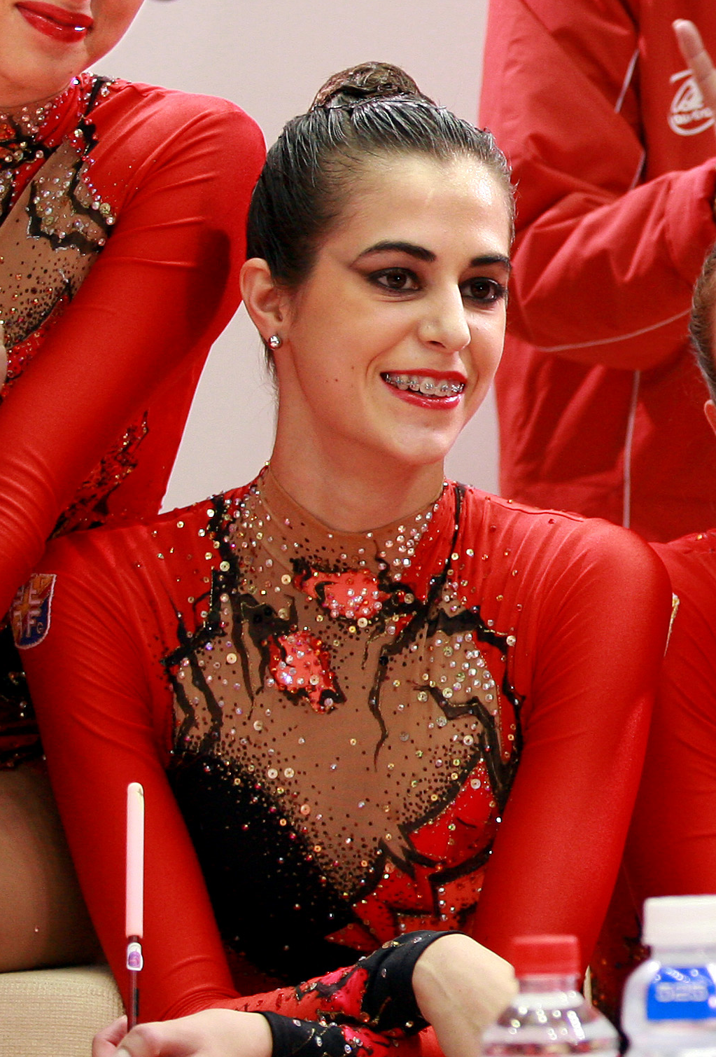 Lara González en la Final de la Copa del Mundo de 2006 en Mie.